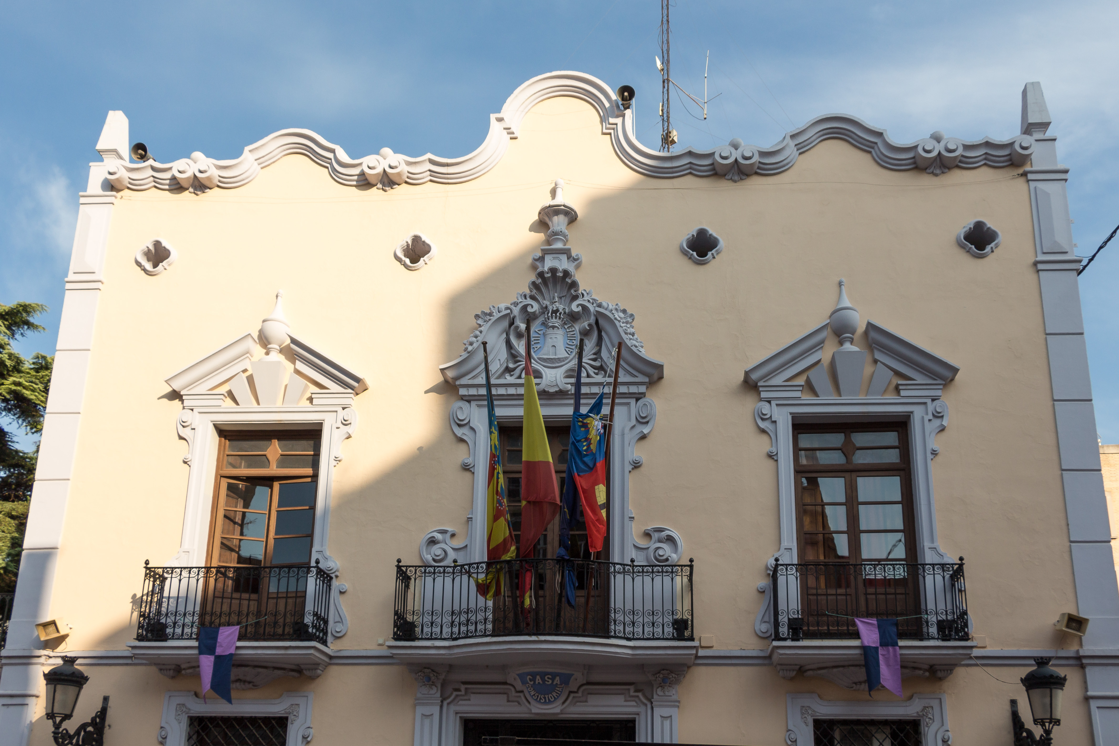 Ayuntamiento de Alginet 20.031-002.